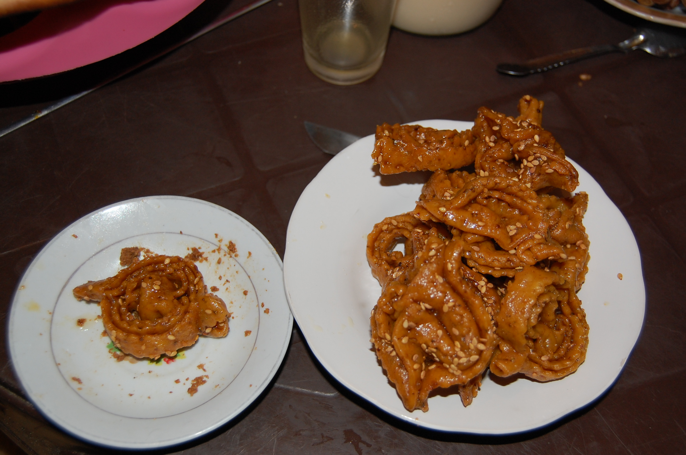 Walon: ene assîtêye di "chebbakiyas"لمغربية: طبصيل شبّاكية